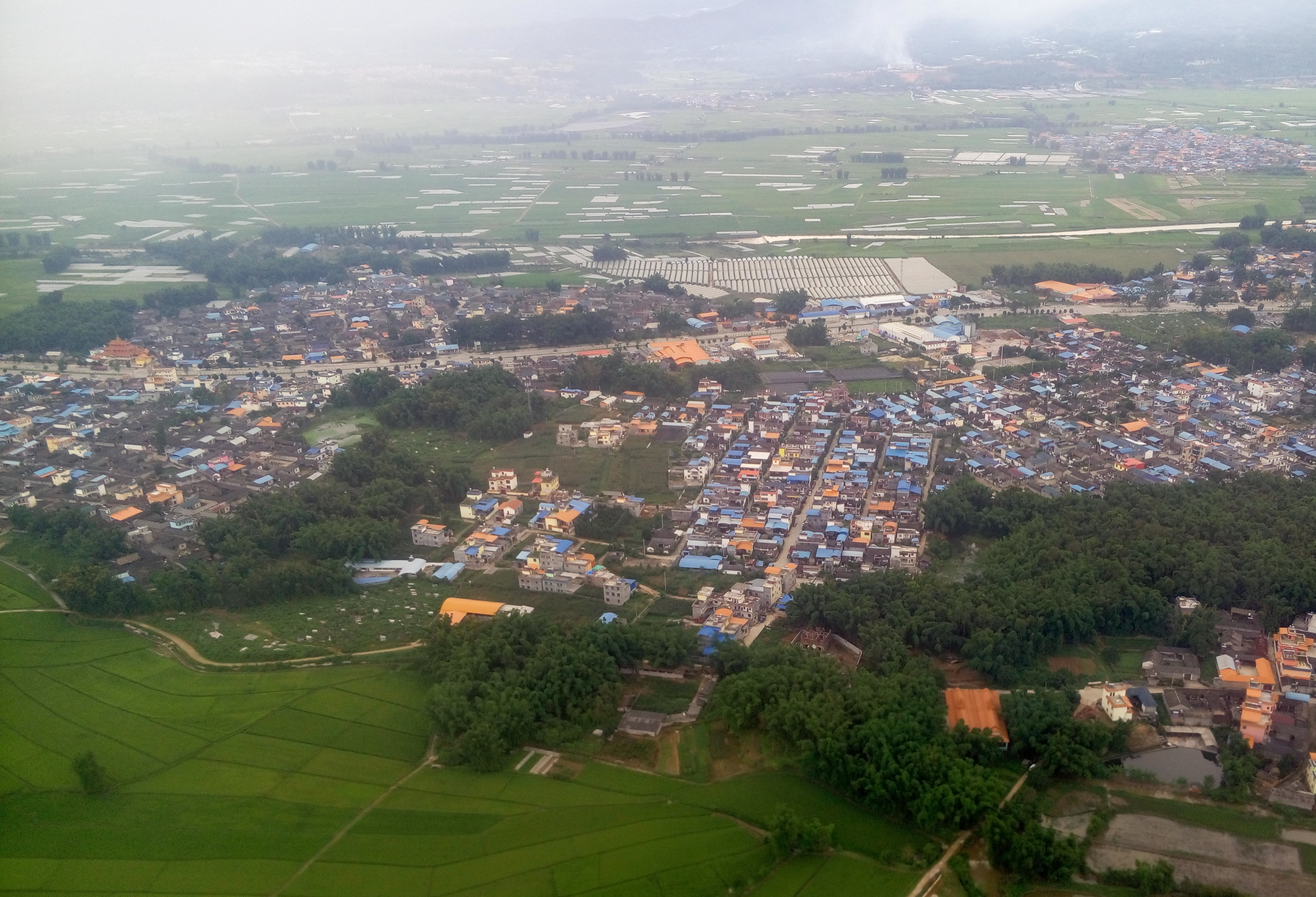 从德宏芒市机场刚起飞的班机上拍摄的风平镇